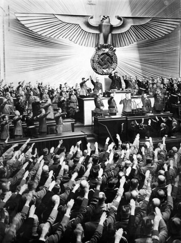 Reichstag, Begrüßung Adolf Hitler Die Abgeordneten des Großdeutschen Reichstags grüßen den Führer (6.10.39.) [Berlin.- Adolf Hitler vor dem Reichstag in der Kroll-Oper zum Abschluss des Feldzugs gegen Polen.] Abgebildete Personen: Hitler, Adolf: Reichskanzler, Deutschland